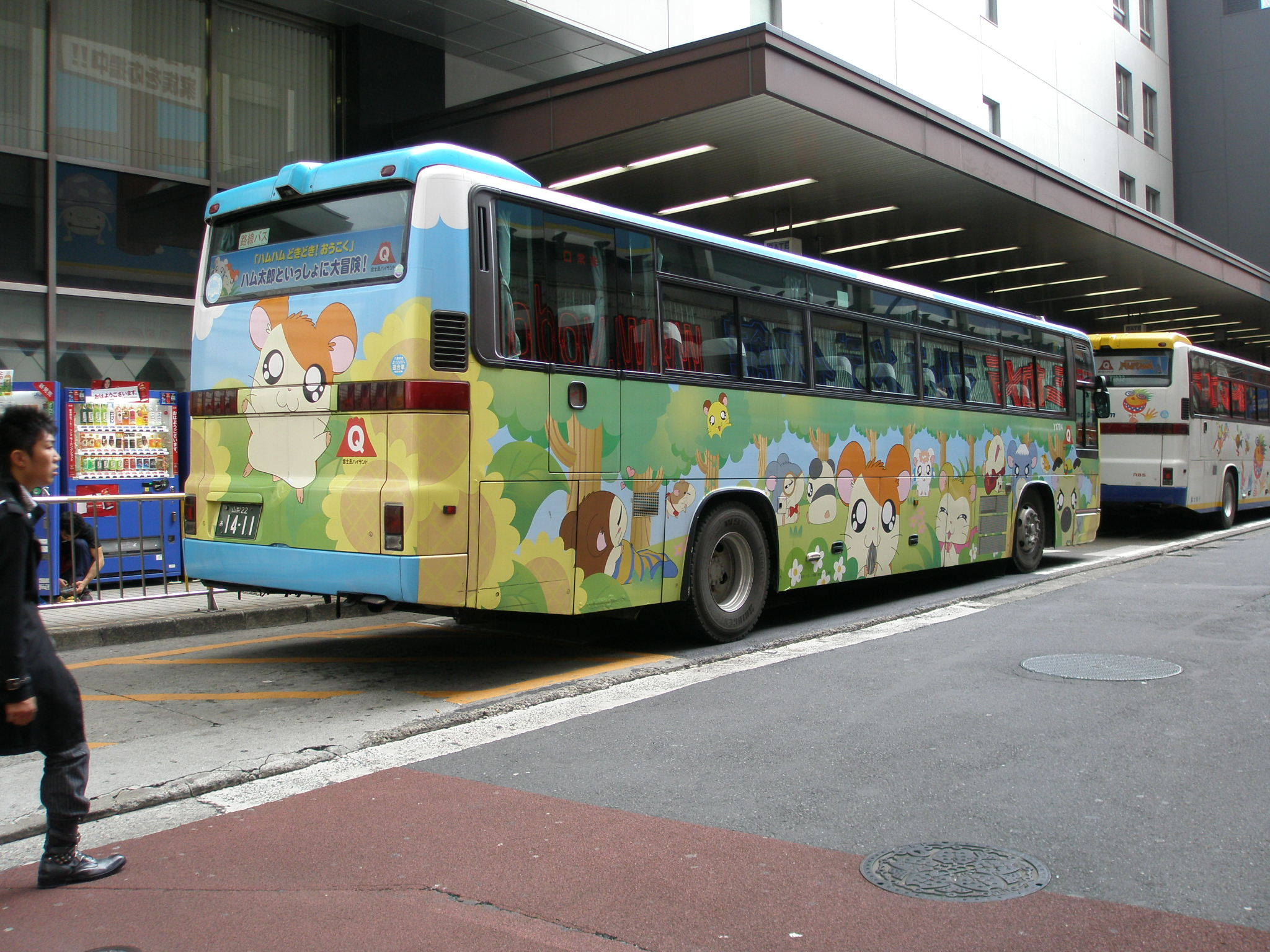 富士急静岡バスのアニメ『とっとこハム太郎』全面広告バス。